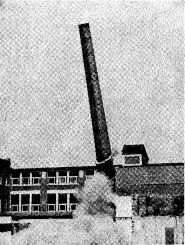 Die Sprengung des 30m hohen, 1911 gebauten Fabrikschlots der Gotthard-Schuhfabrik (ehemals Püls) in Burgkunstadt.